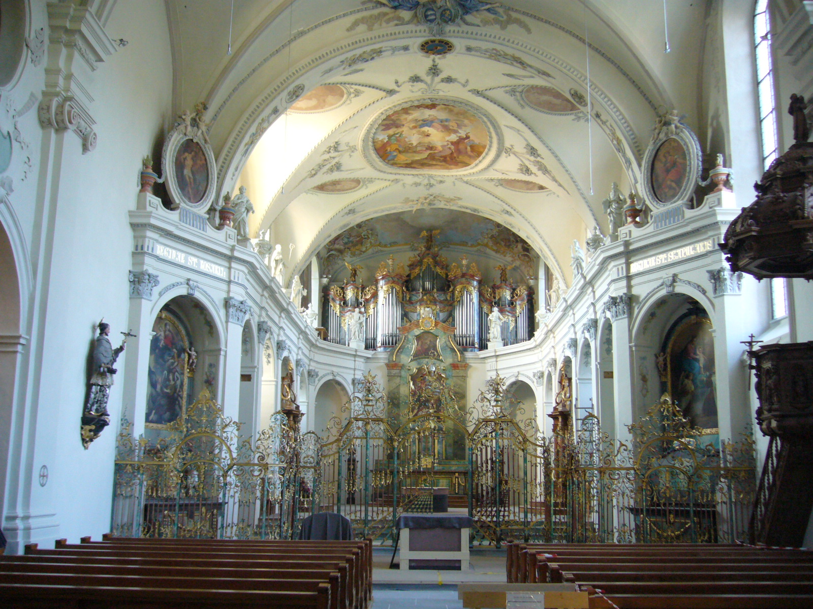 Kloster Fischingen, Kanton Thurgau. Fotografiert von Peter Berger, 23. Juli 2006.